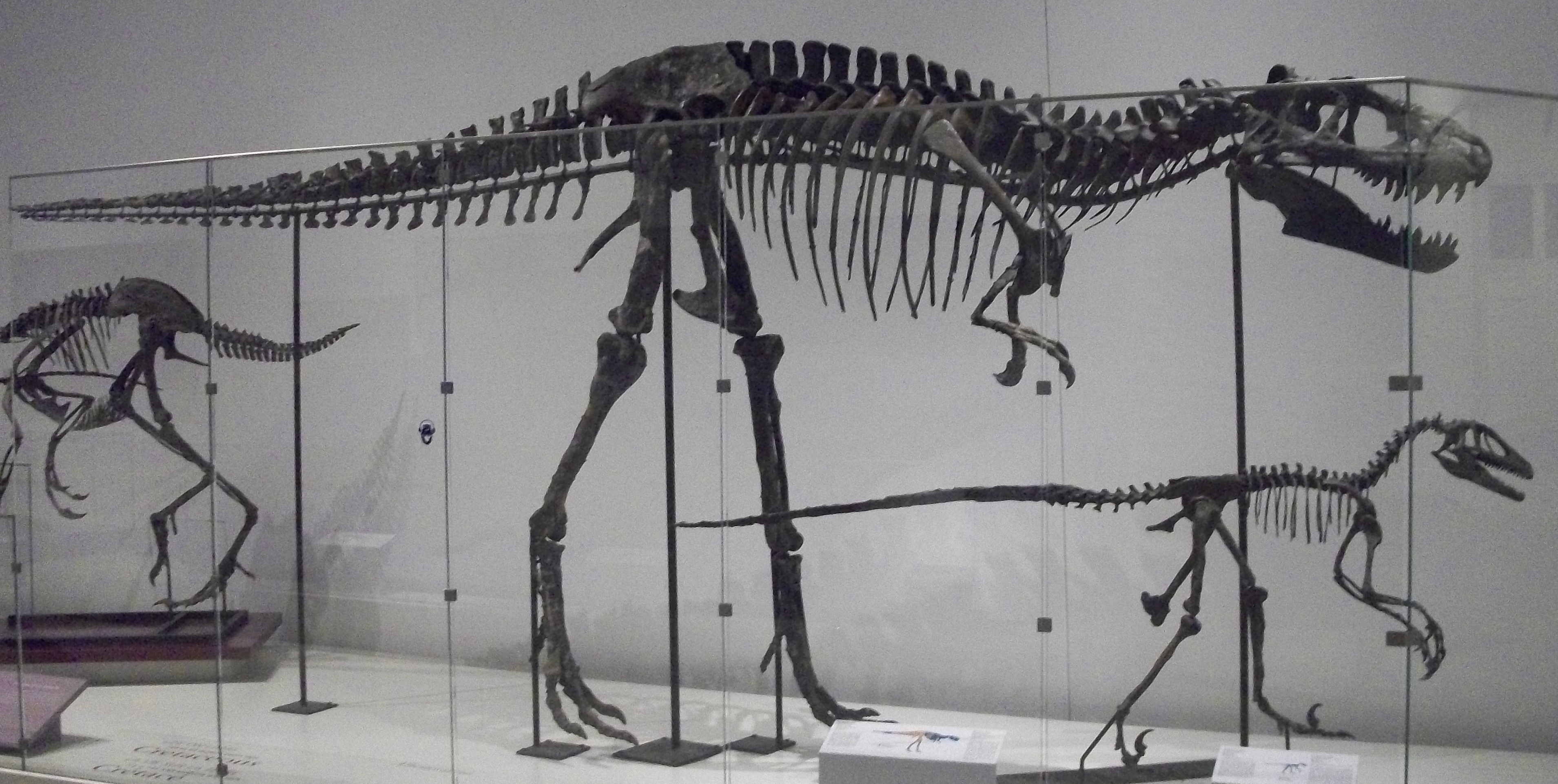 Mounted skeletons of Albertosaurus libratus (=Gorgosaurus, specimen ROM 1247) and Deinonychus antirrhopus at the Royal Ontario Museum